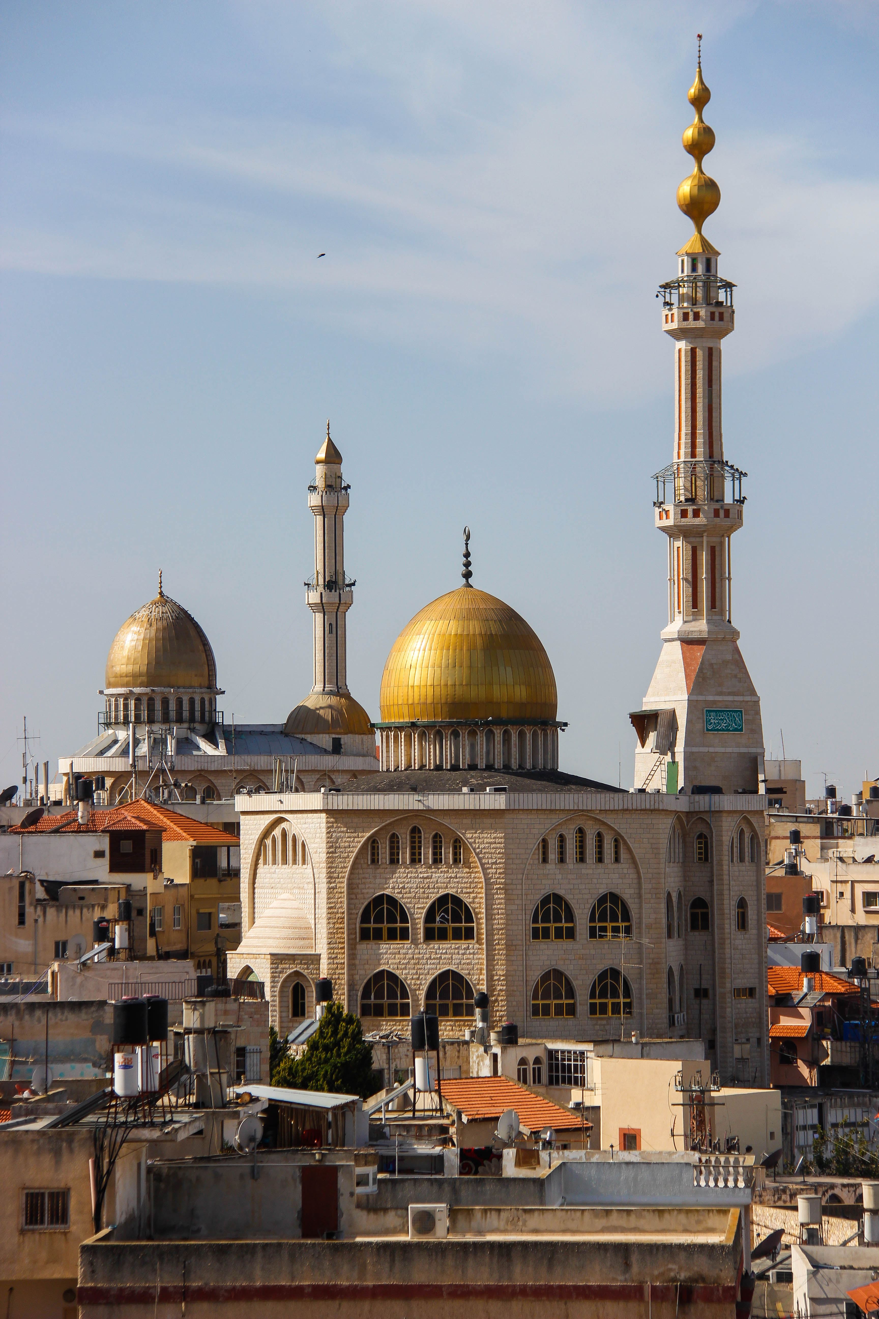 مركز أم الفحم